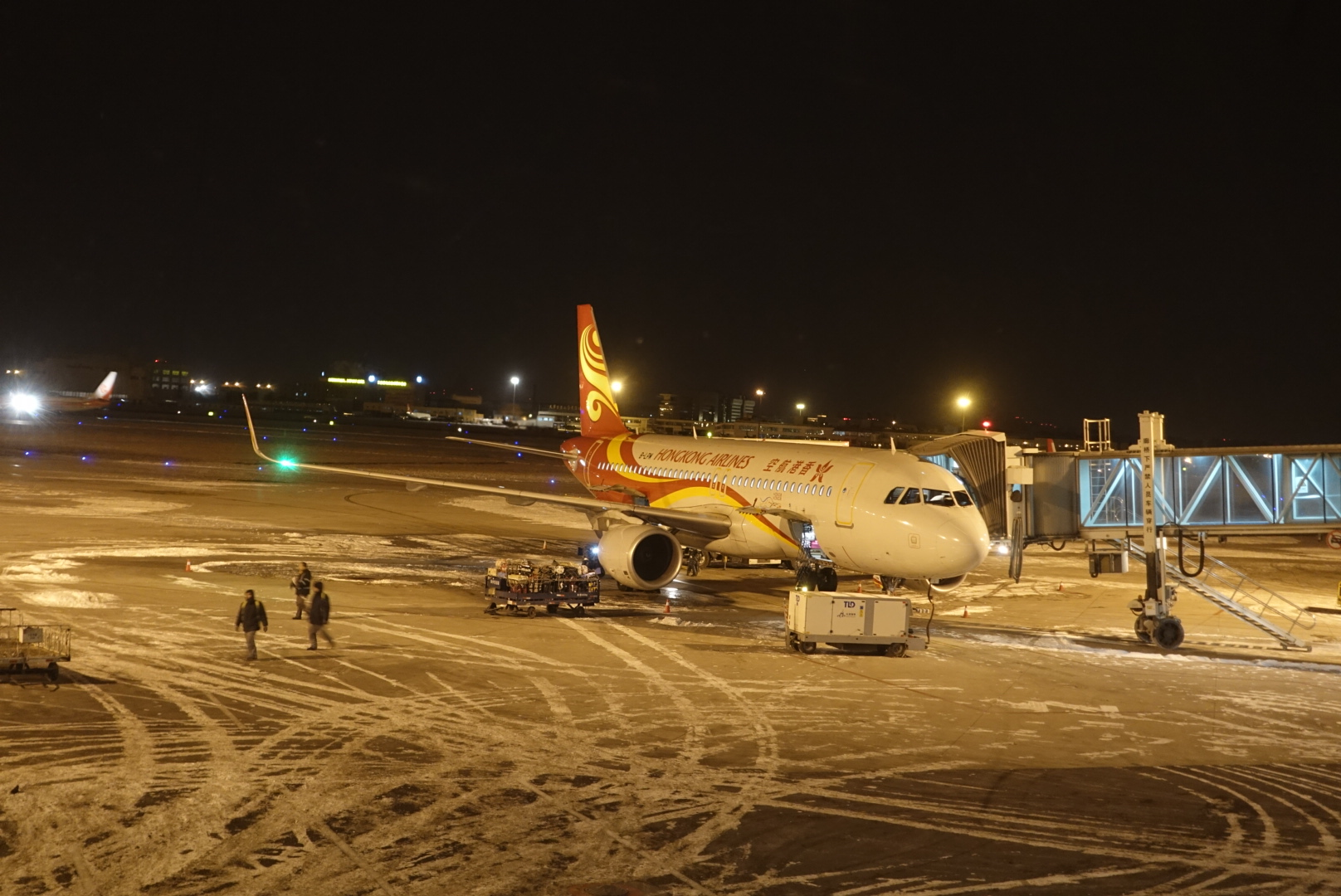 中文（中国大陆）: 停靠在雪后天津机场的香港航空A320-214(WL)